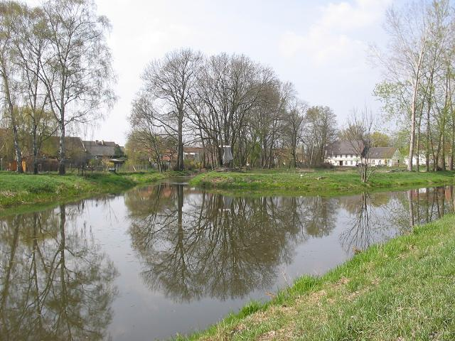 Nuthe bei Saarmund. Blickrichtung Norden mit Abzweig des Mühlgrabens. Die weißen Gebäude im Hintergrund gehören zur früheren Wassermühle. (Ergänzt von Biberbaer (talk) 12:45, 5 February 2010 (UTC)) Selbst fotografiert, April 2004 GNU FDL